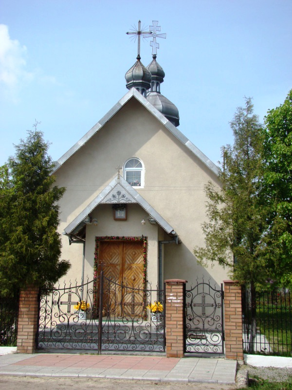 Українська Православна Церква - с. Пикуловичі